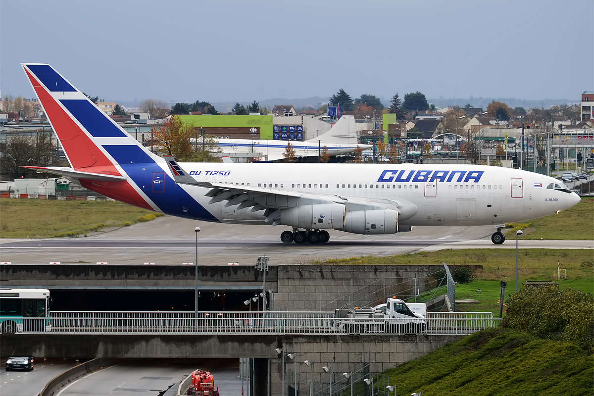 Cubana, CU-T1250, Ilyushin Il-96-300